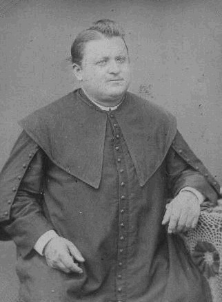 Karel Chotovský (1842 - 1897), Český římskokatolický kněz a spisovatel.